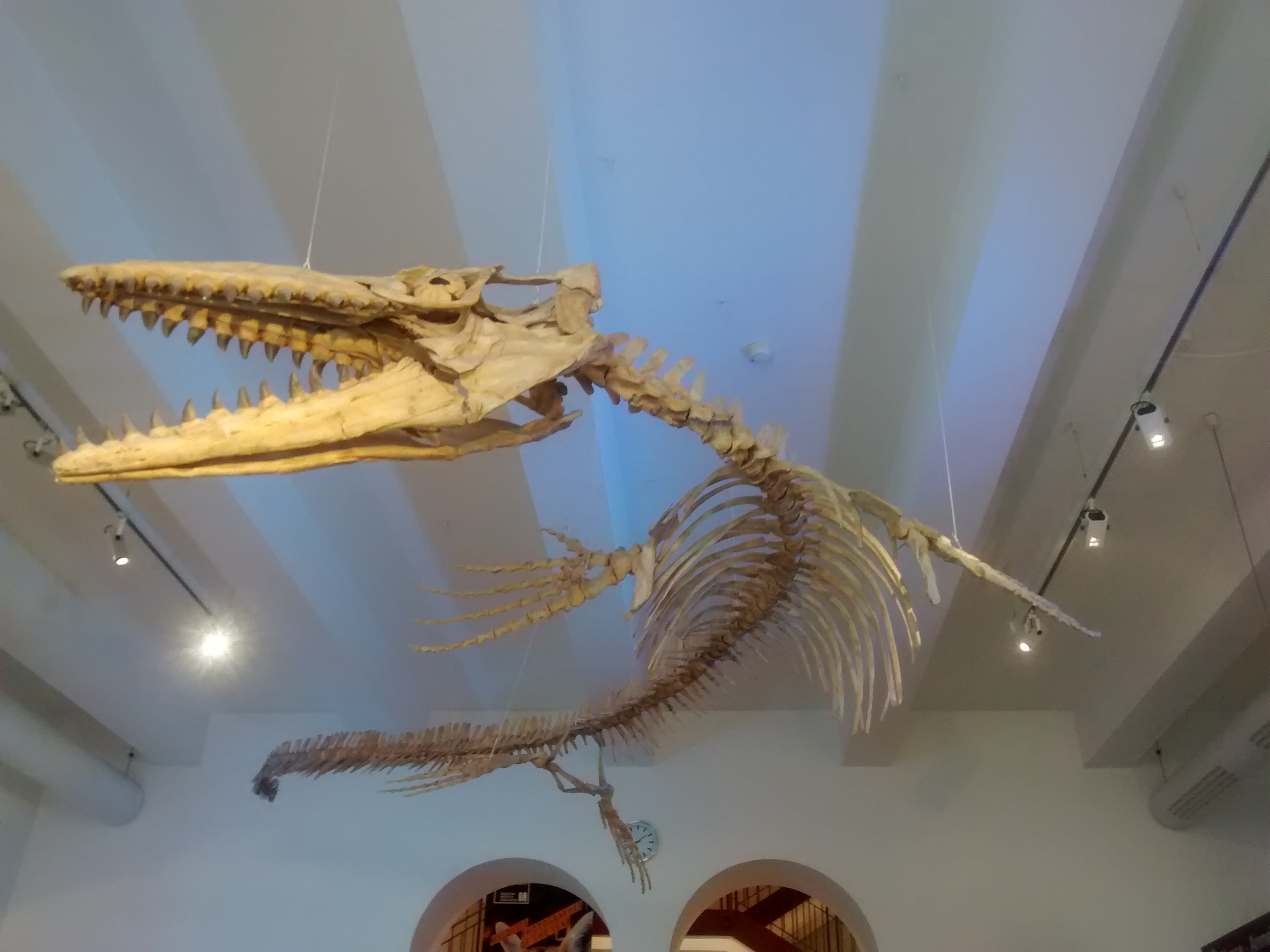 Mosasaurus-Skelett im Foyer des Mensch & Natur-Museums, München.